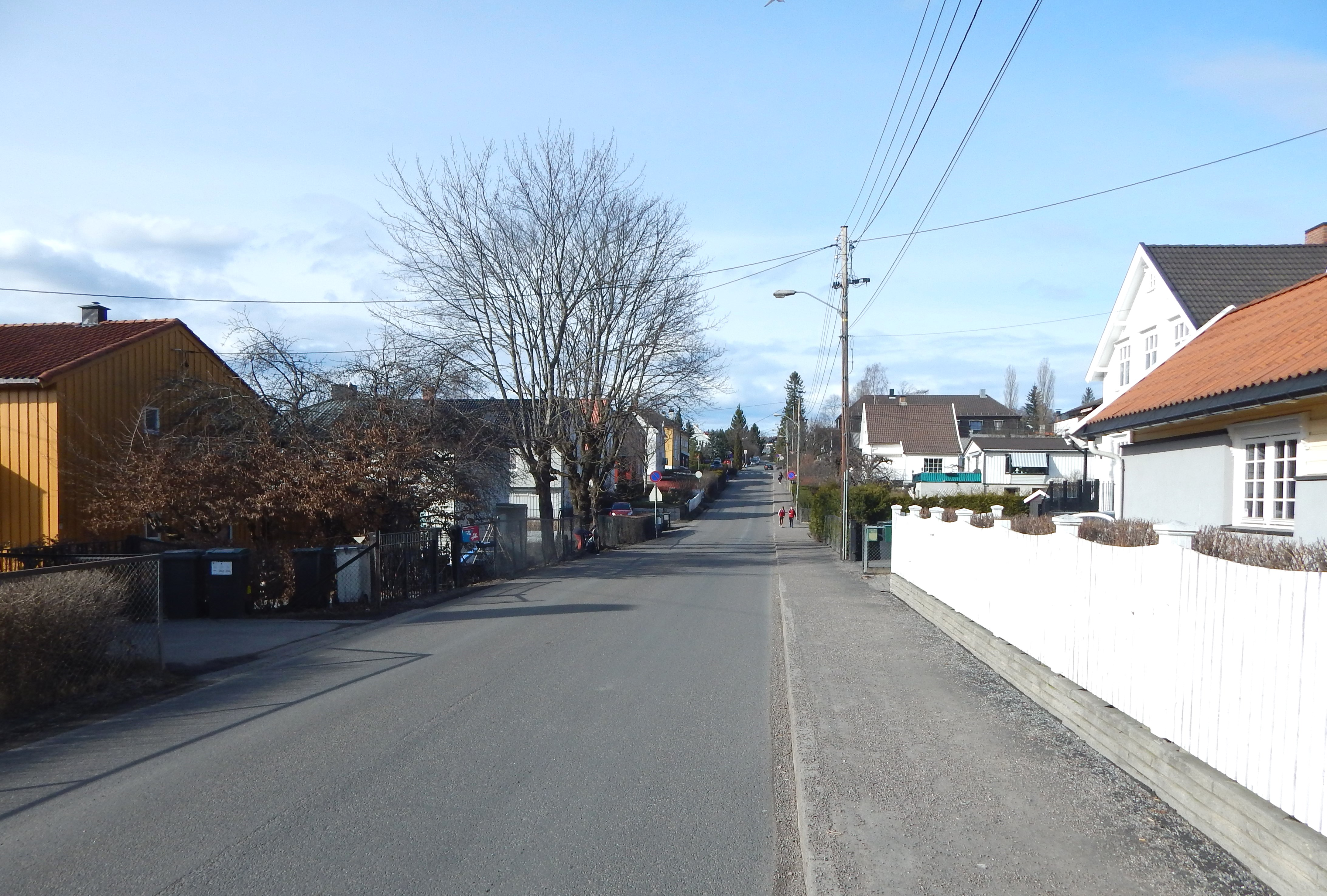 Lettvintveien mellom Kjelsåsveien og Grefsenveien